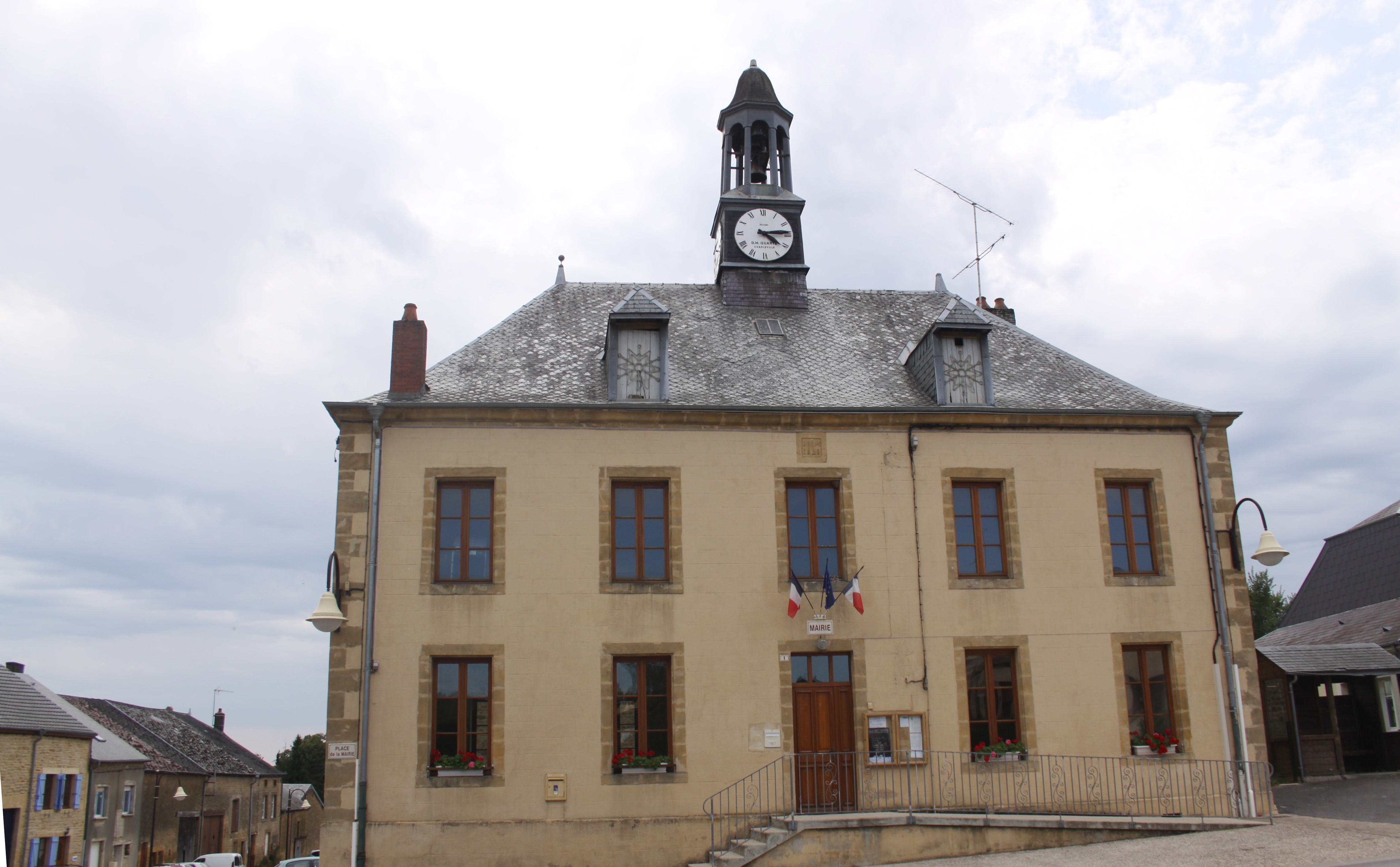 Village Ardennais